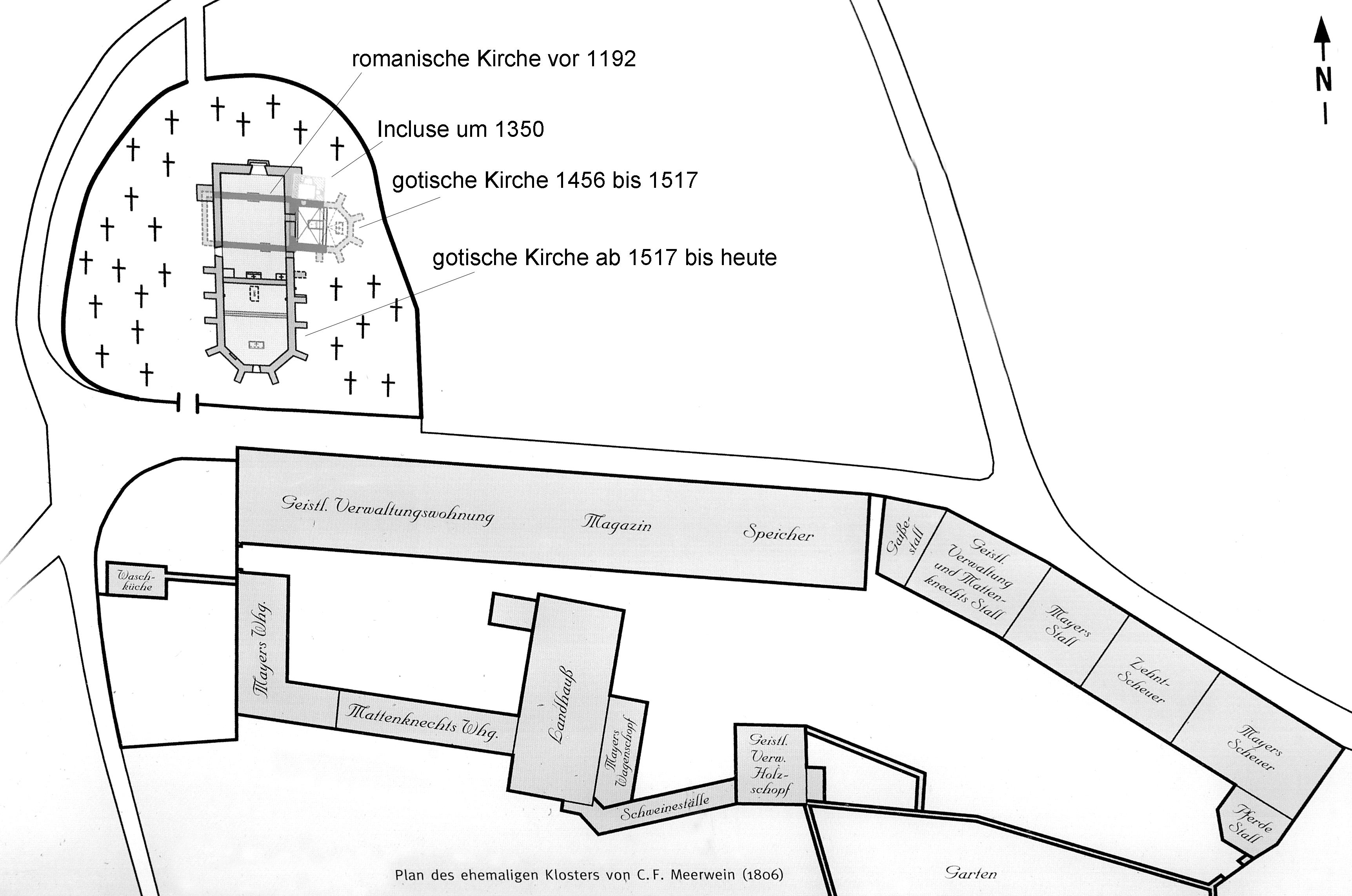 Skizze der Anlage von C. F. Meerwein aus dem Jahre 1806